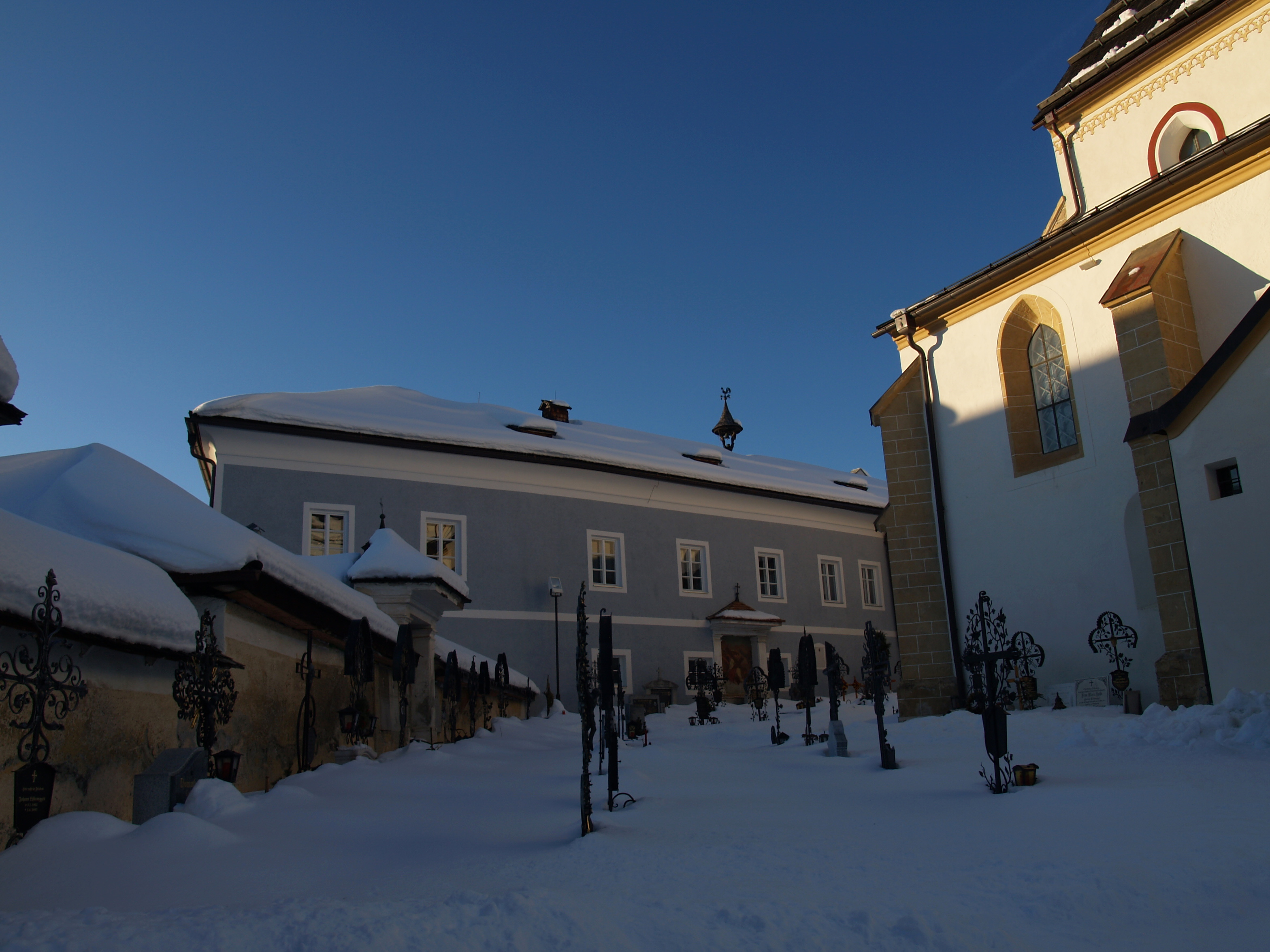 Pfarrhof der kath.Kirche Mariapfarr aufgenommen von der Eingangsseite der Kirche